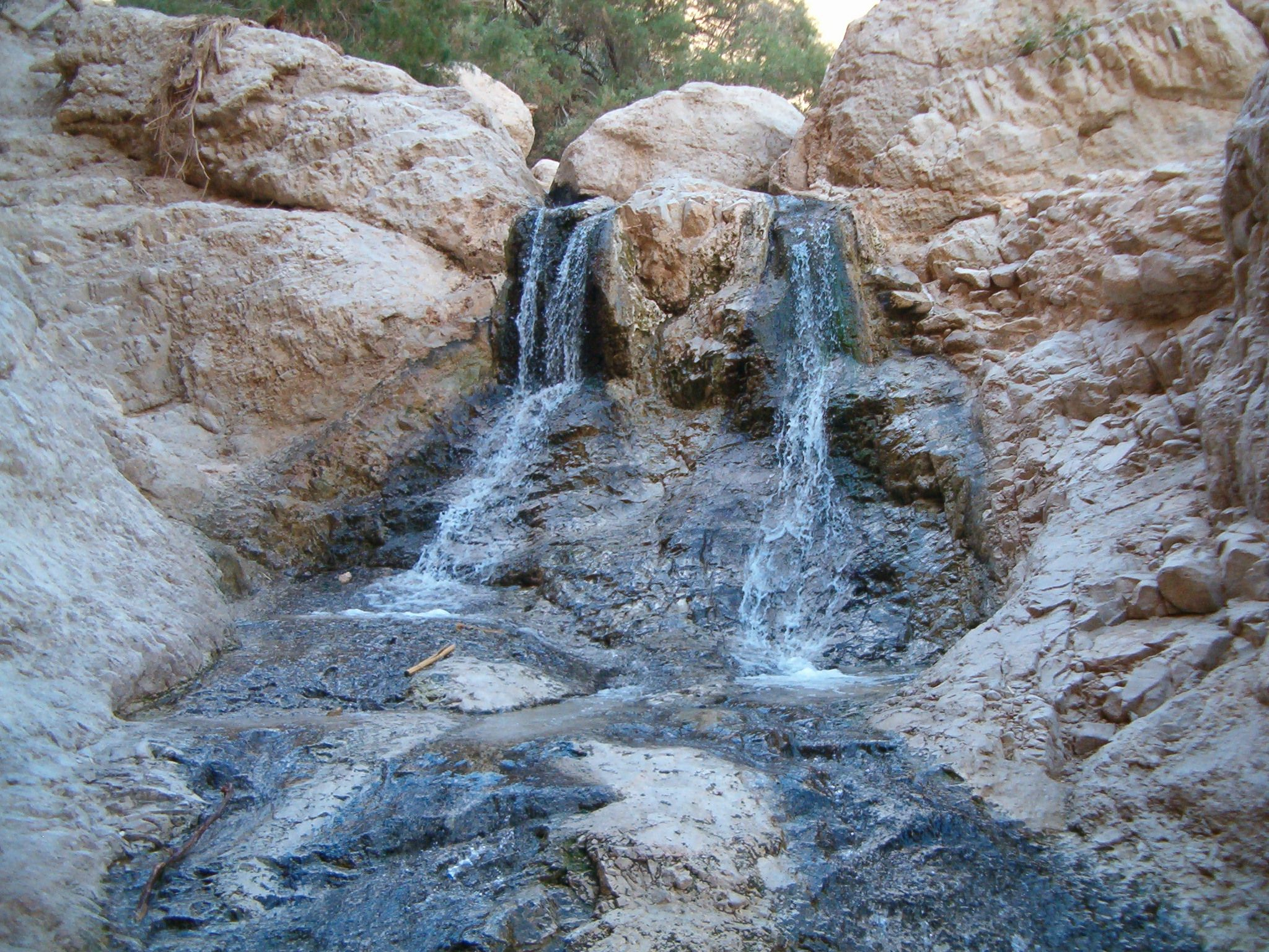 עין בוקק, 2005. צילם י.ש. 09:12, 13 ינואר 2006 (UTC)